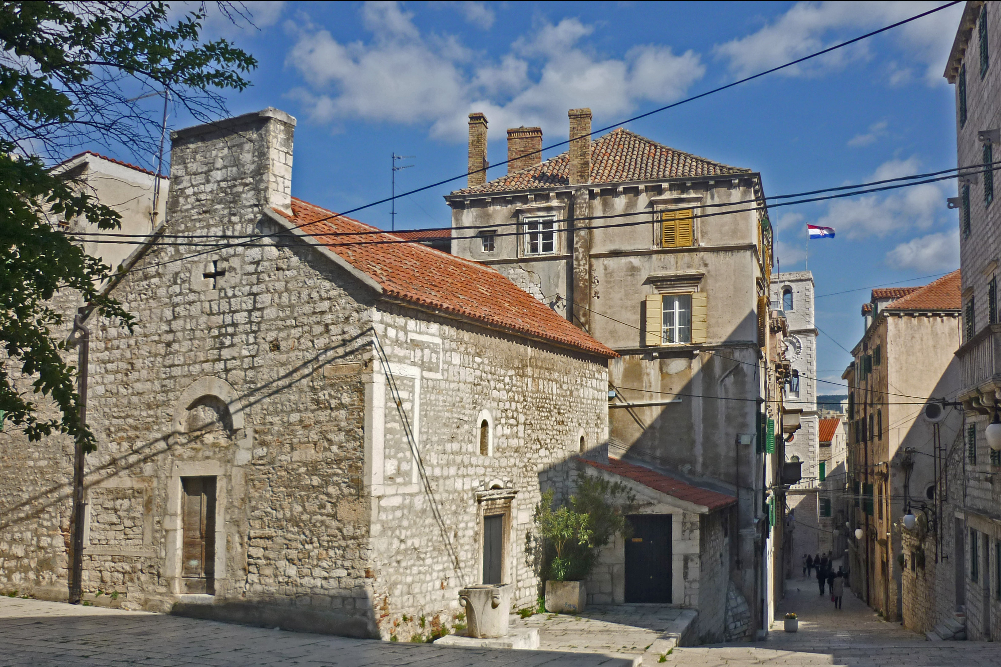 Kirche des hl. Krševan (Chrysogonus von Aquileia) in Šibenik (dt.: Sibenning, ital.: Sebenico)